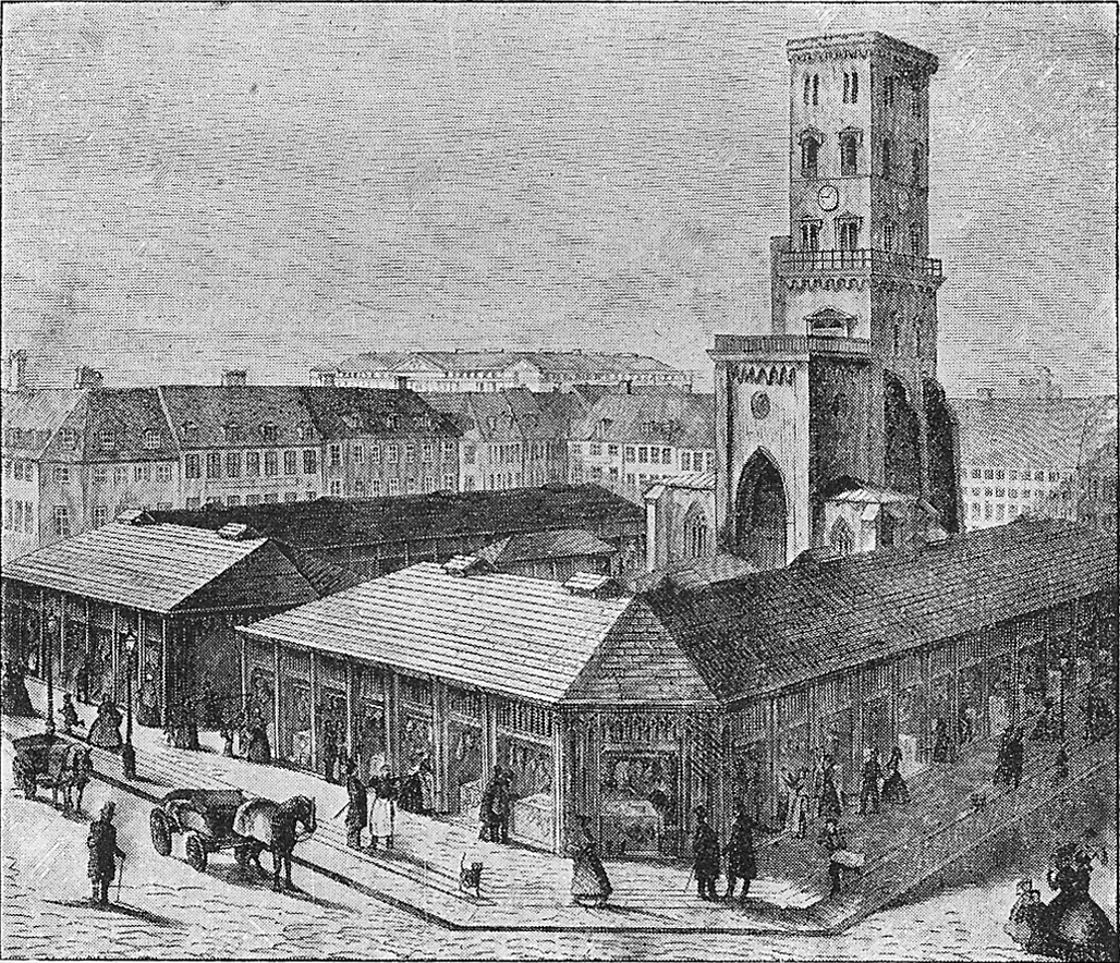 Nikolaj Tårn med Slagterboderne (Københavns mave). Omkring midten af 1800-tallet.